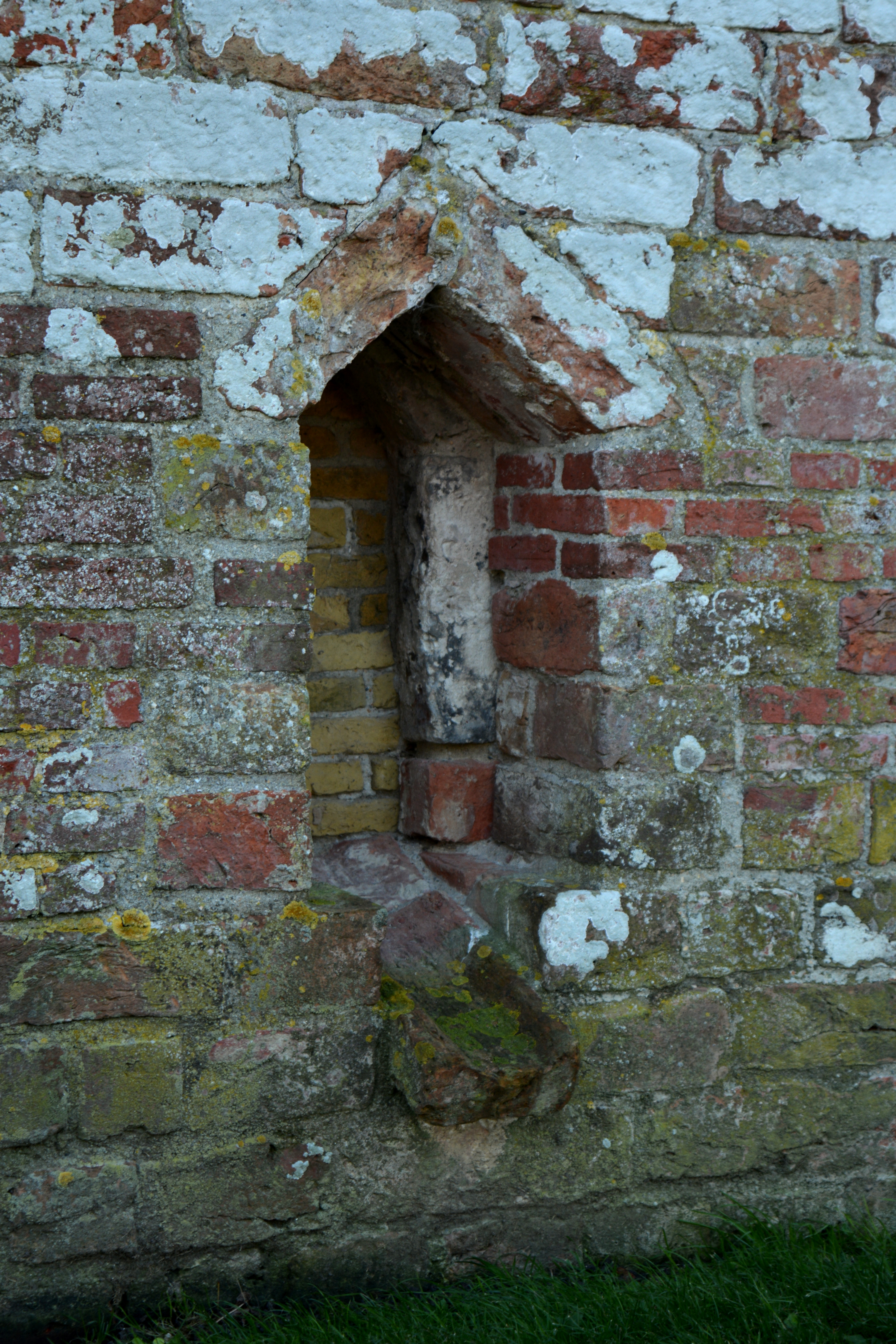 Nicolaaskerk, Swichum (piscina)